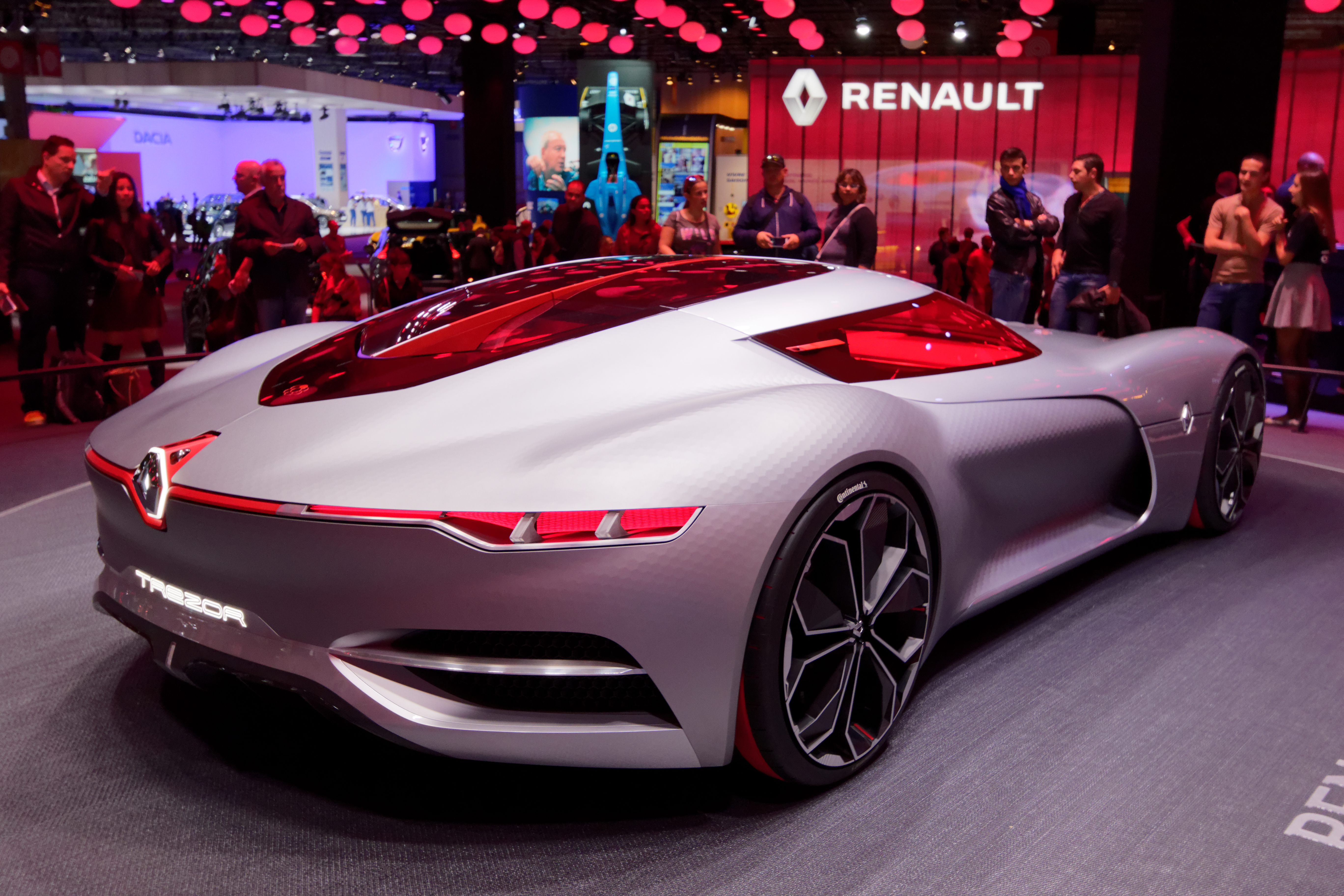 Une Renault Trezor présentée lors du mondial de l'automobile de Paris 2016.